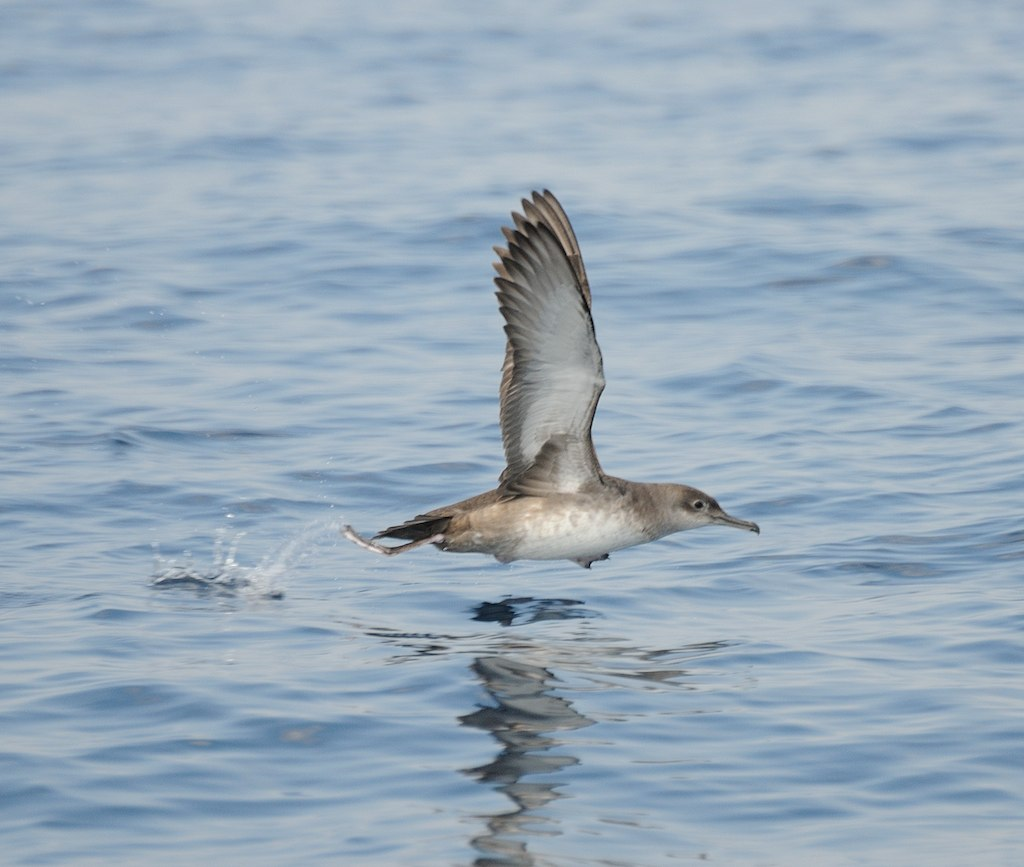 Skua_20100427_160205_04